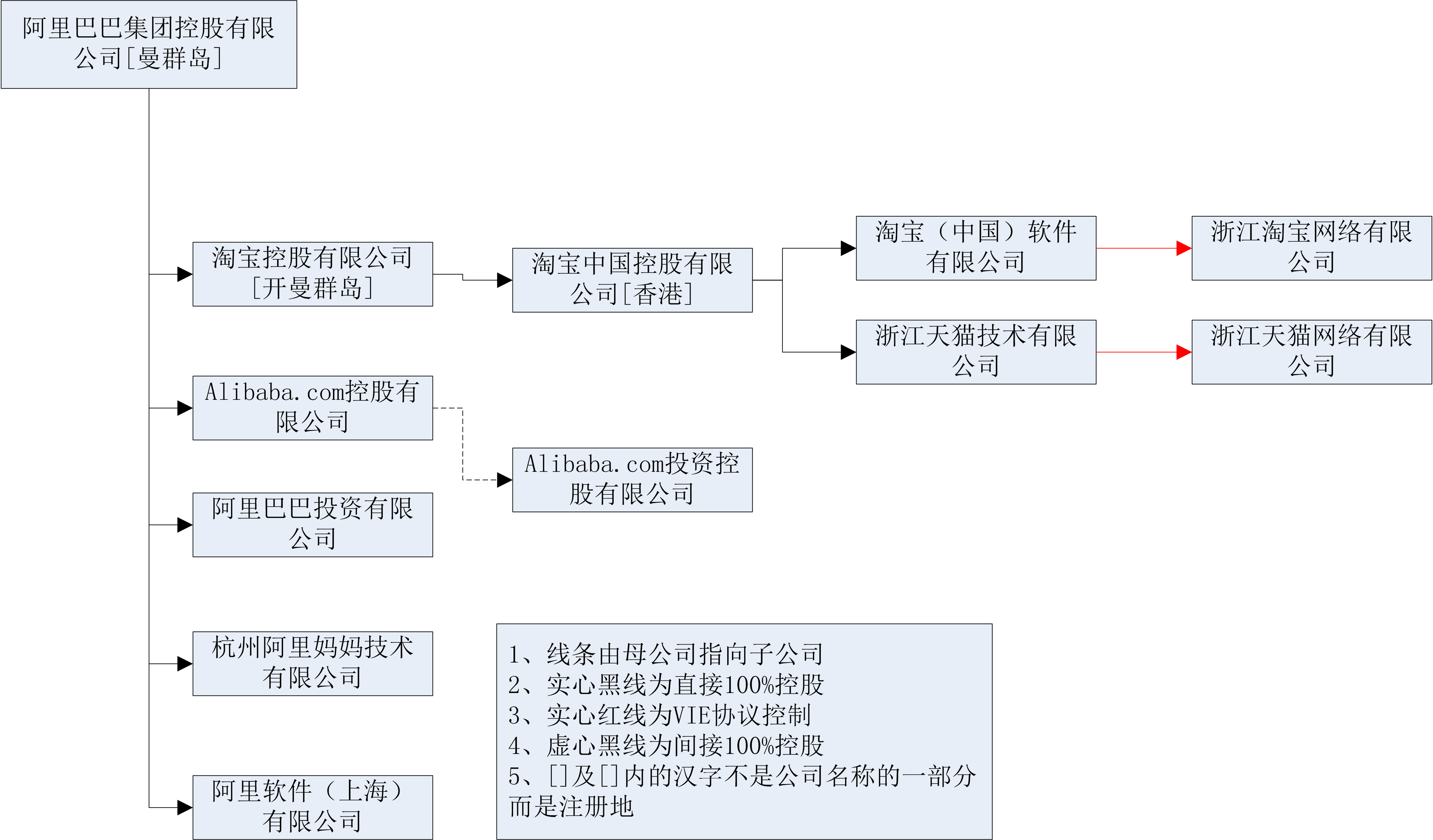 阿里巴巴集团控股有限公司及其子公司的关系图，内容来源于网络，我仅仅对其文本整理成了图片，内容来源：